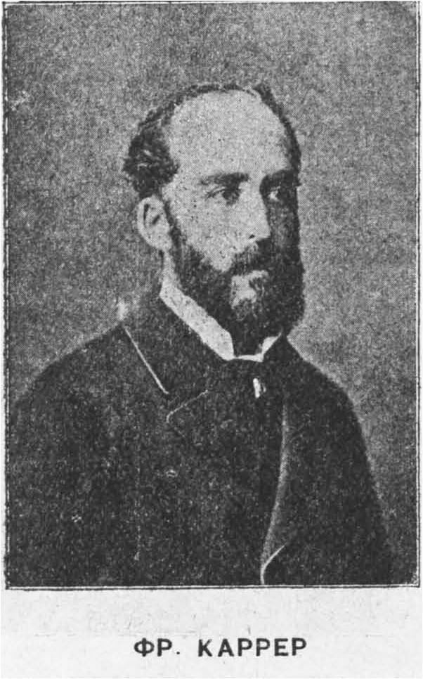 Φρειδερίκος Κ. Καρρέρ (Ζάκυνθος, 5 Μαρτίου 1841 - 8 Φεβρουαρίου 1917), Έλληνας πεζογράφος και πολιτικός